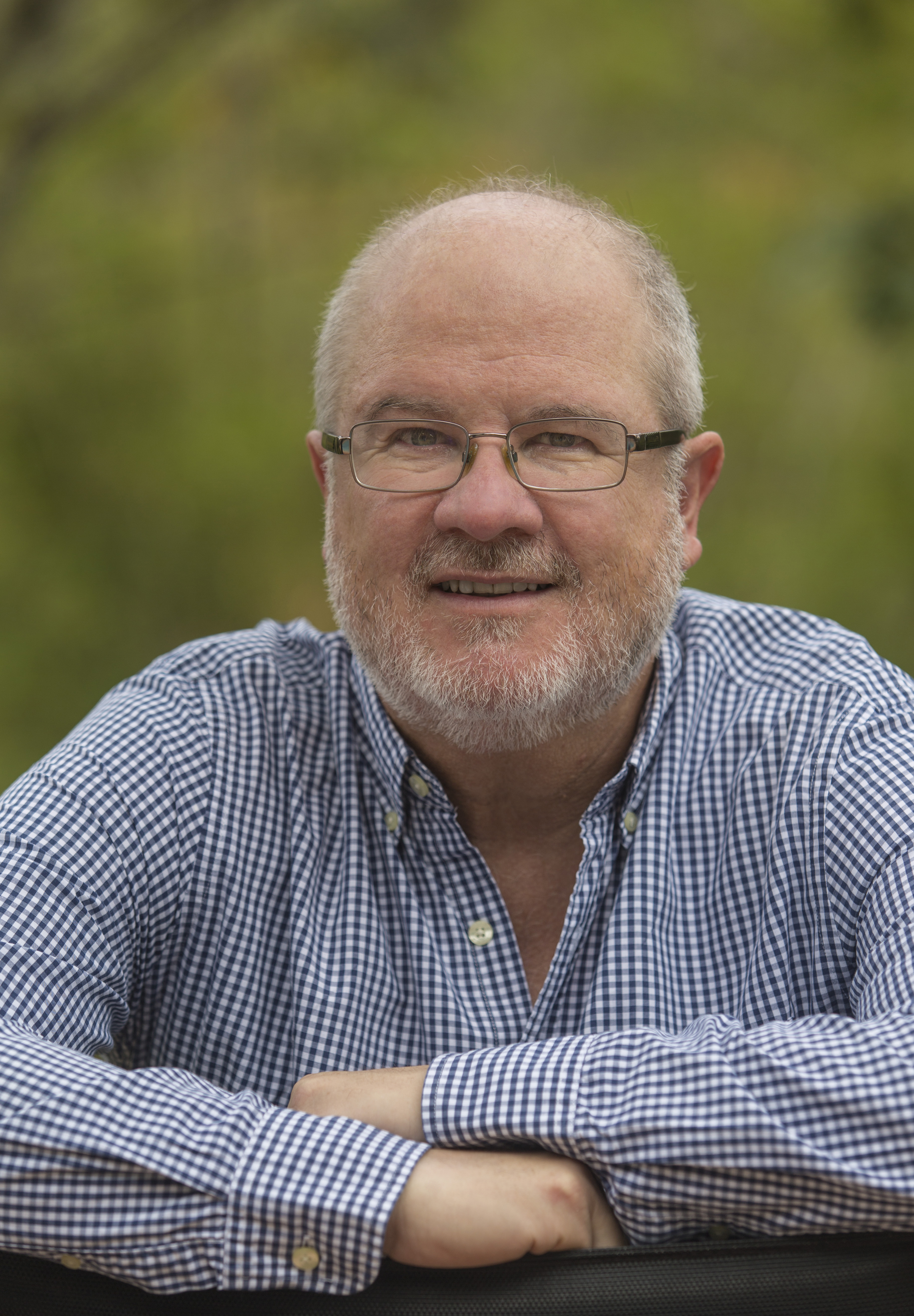 Gerardo Reyes